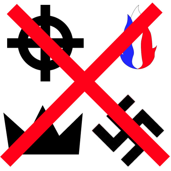 Anti extrême droite